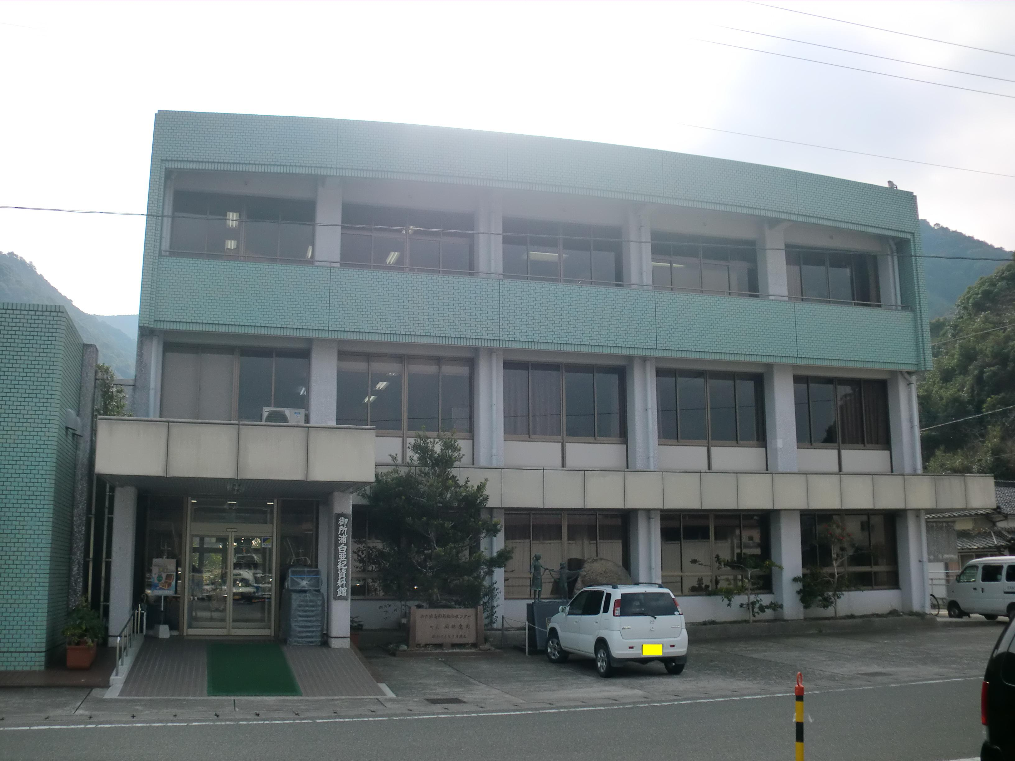 熊本県天草市にある御所浦（ごしょうら）白亜紀資料館